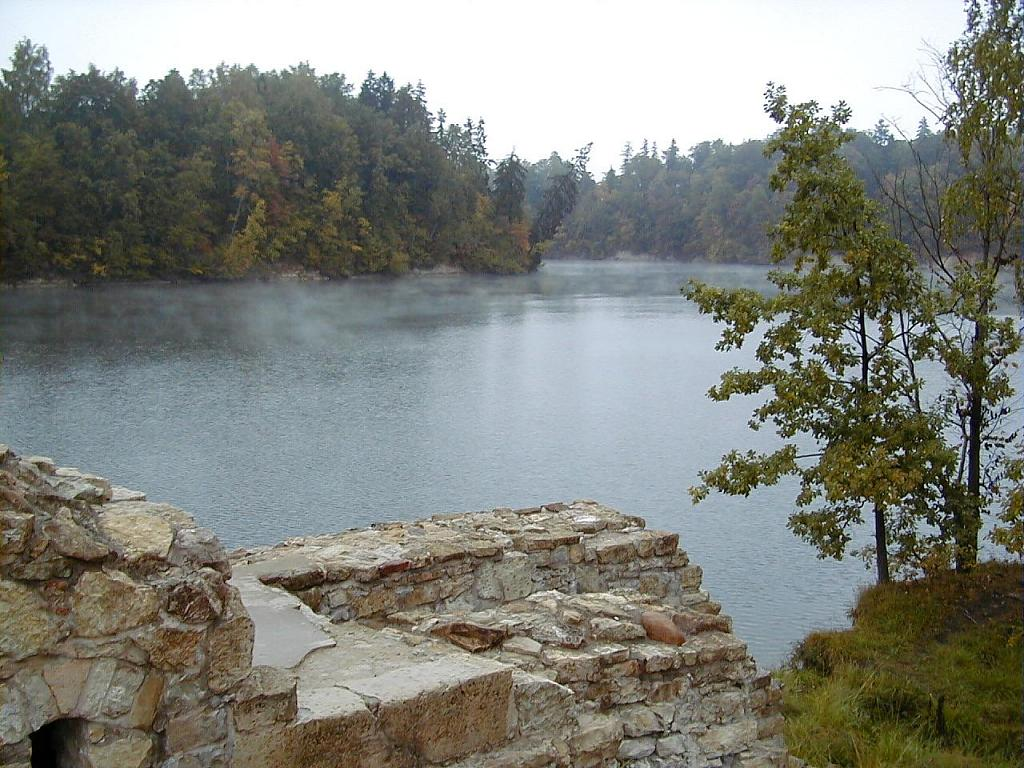 Pērse pie Kokneses pilsdrupām 2002-09-21